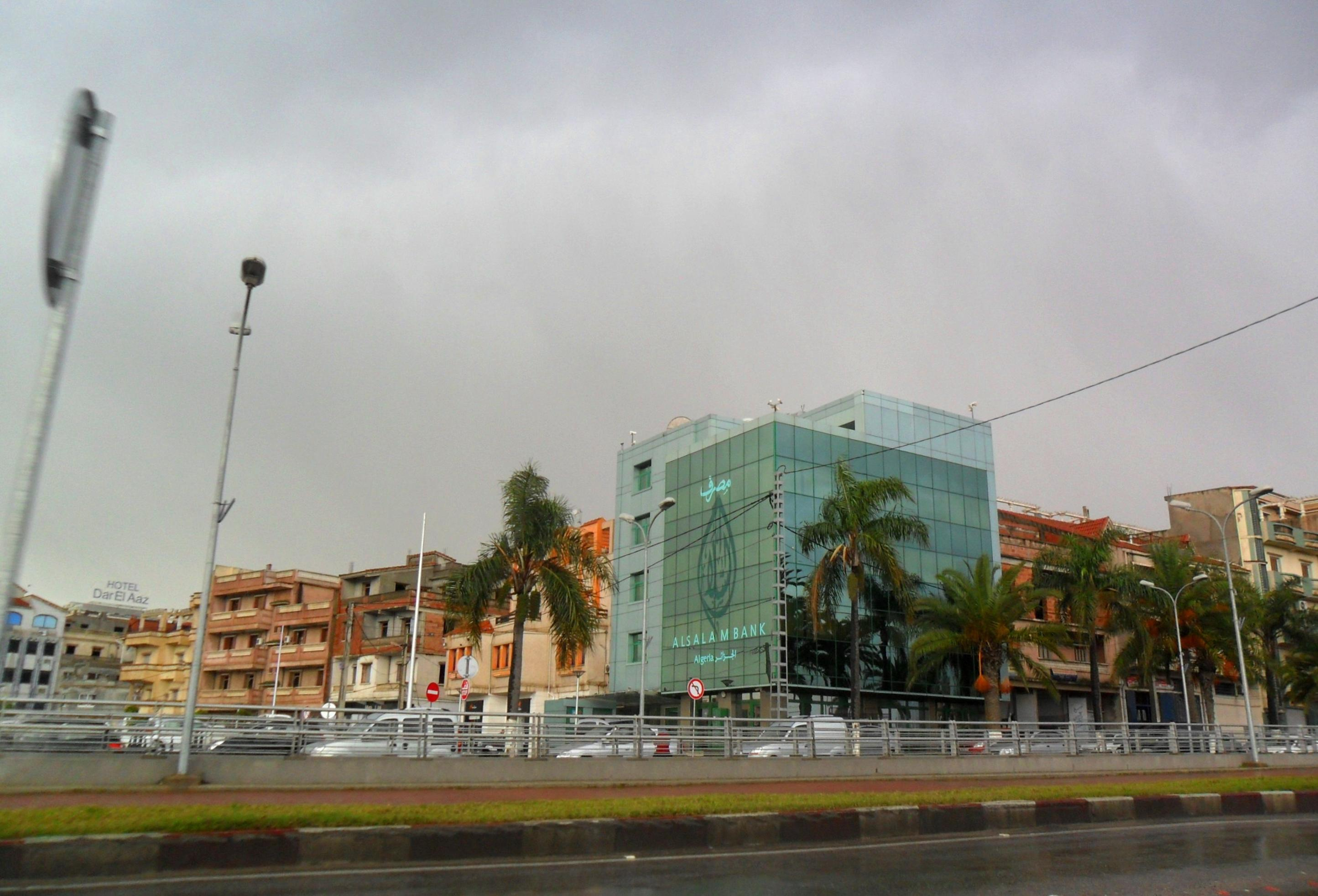 Al Salam Banque مصرف السلام